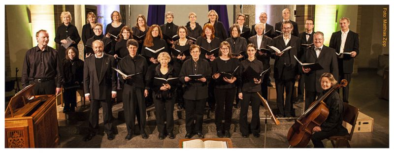 Kasseler Bachchor 2014